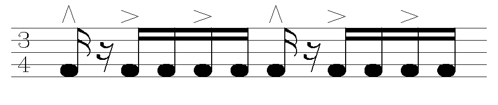 Kolá rhythm model